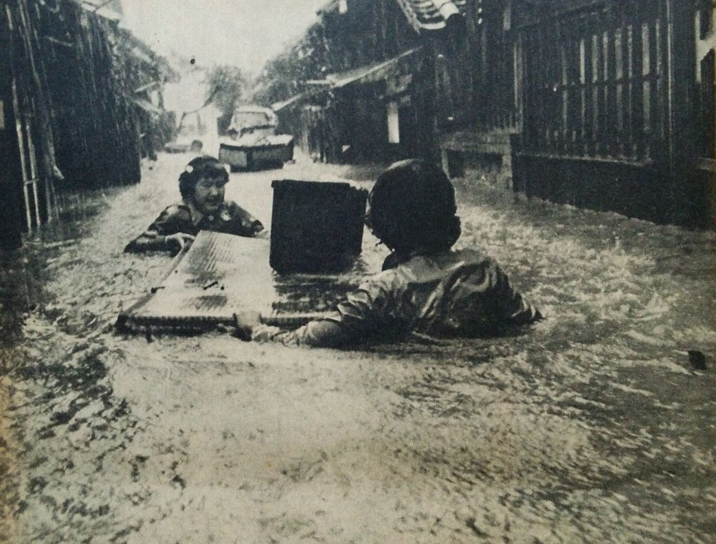 昭和28年西日本水害の際の、福岡県小倉市宇佐町